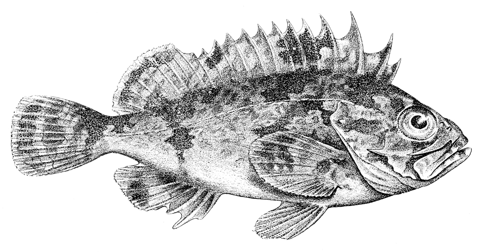 Gymnapistes marmoratus